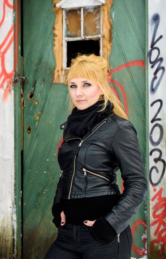 Kirjailija Laura Gustafsson helmikuussa 2016 – kuvaaja: Markus Sommers